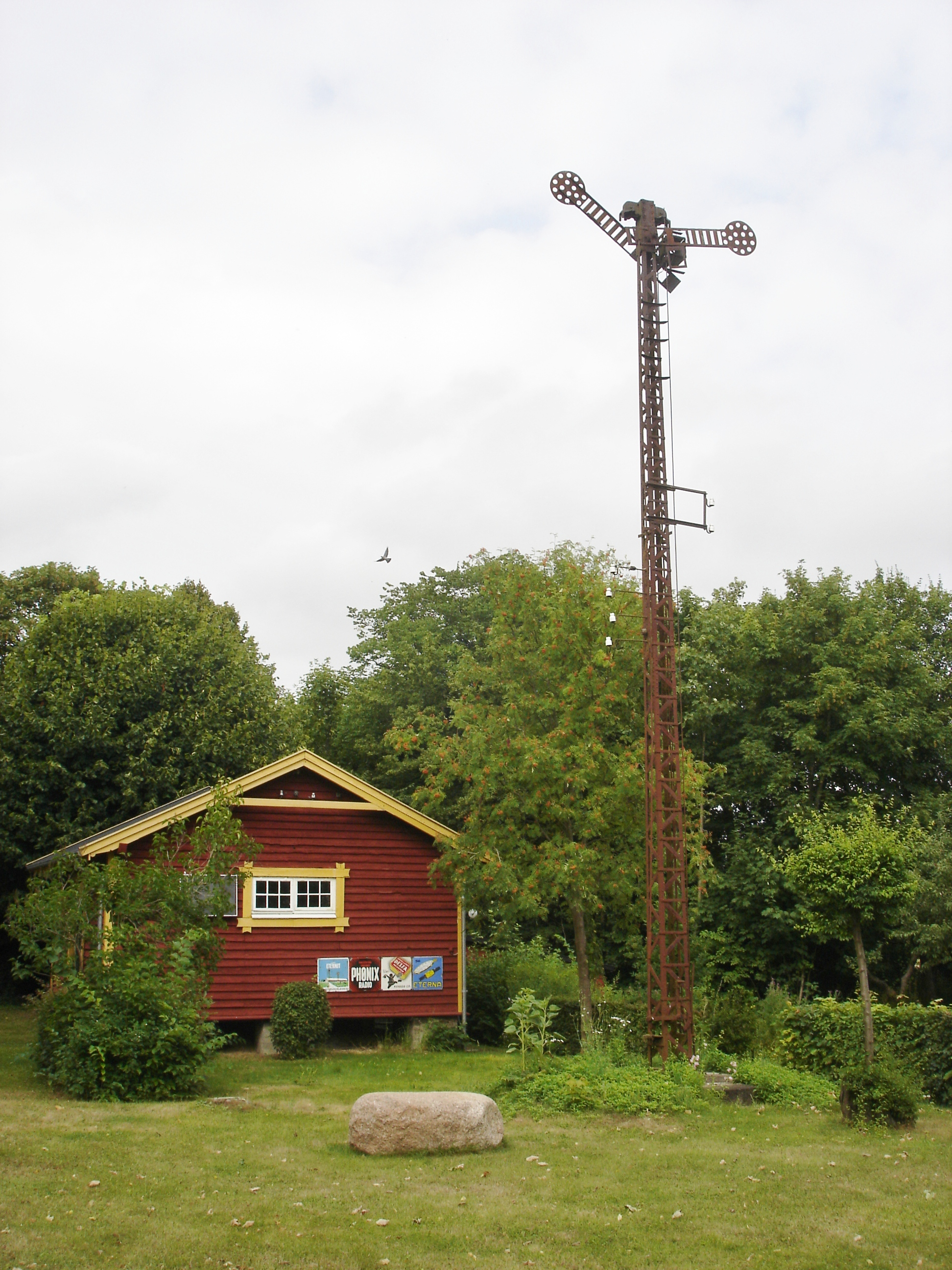 Fredet varehus og signalmast på Flintinge Station